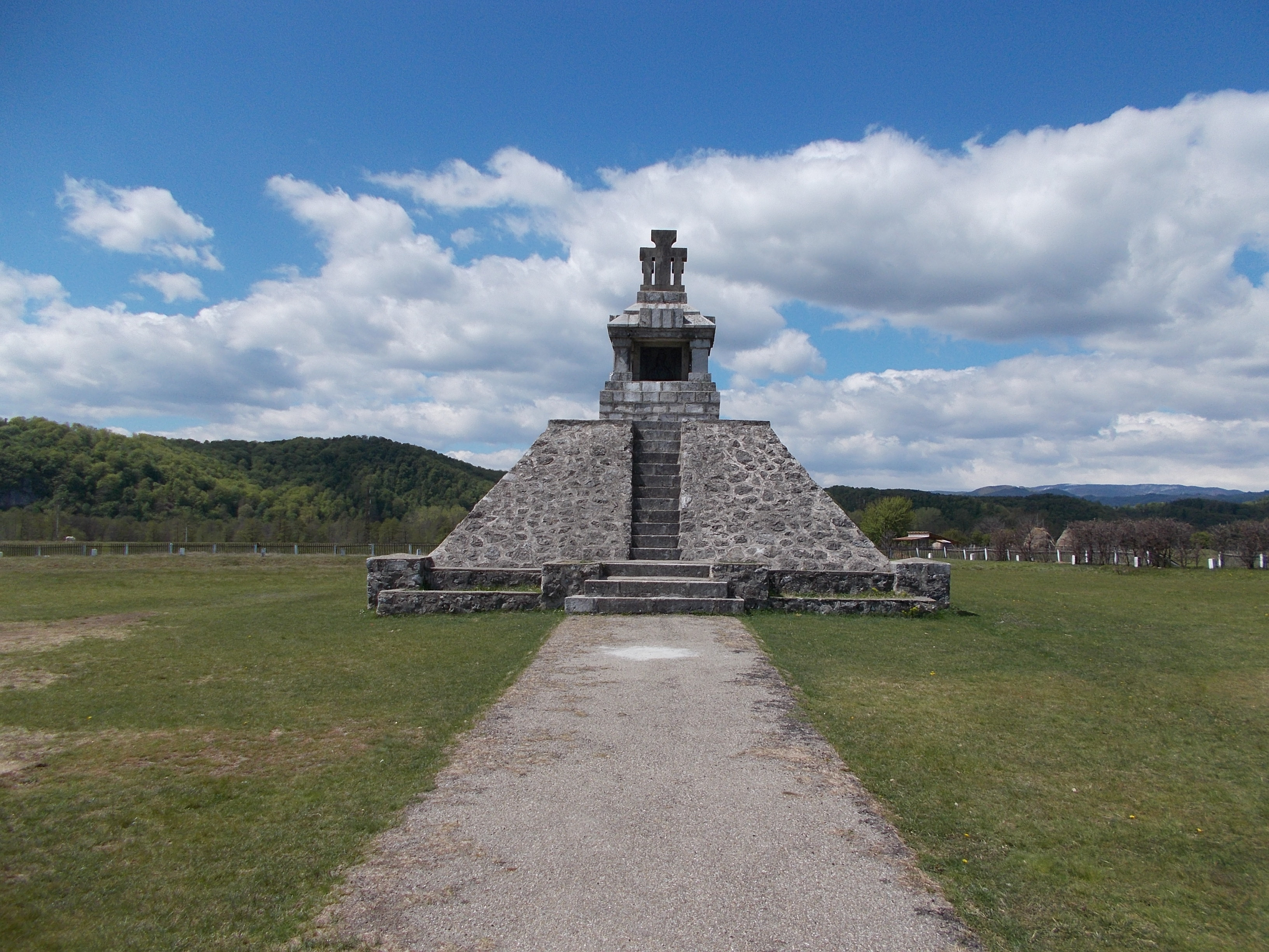 Monumentul „Proclamației de la Padeș”